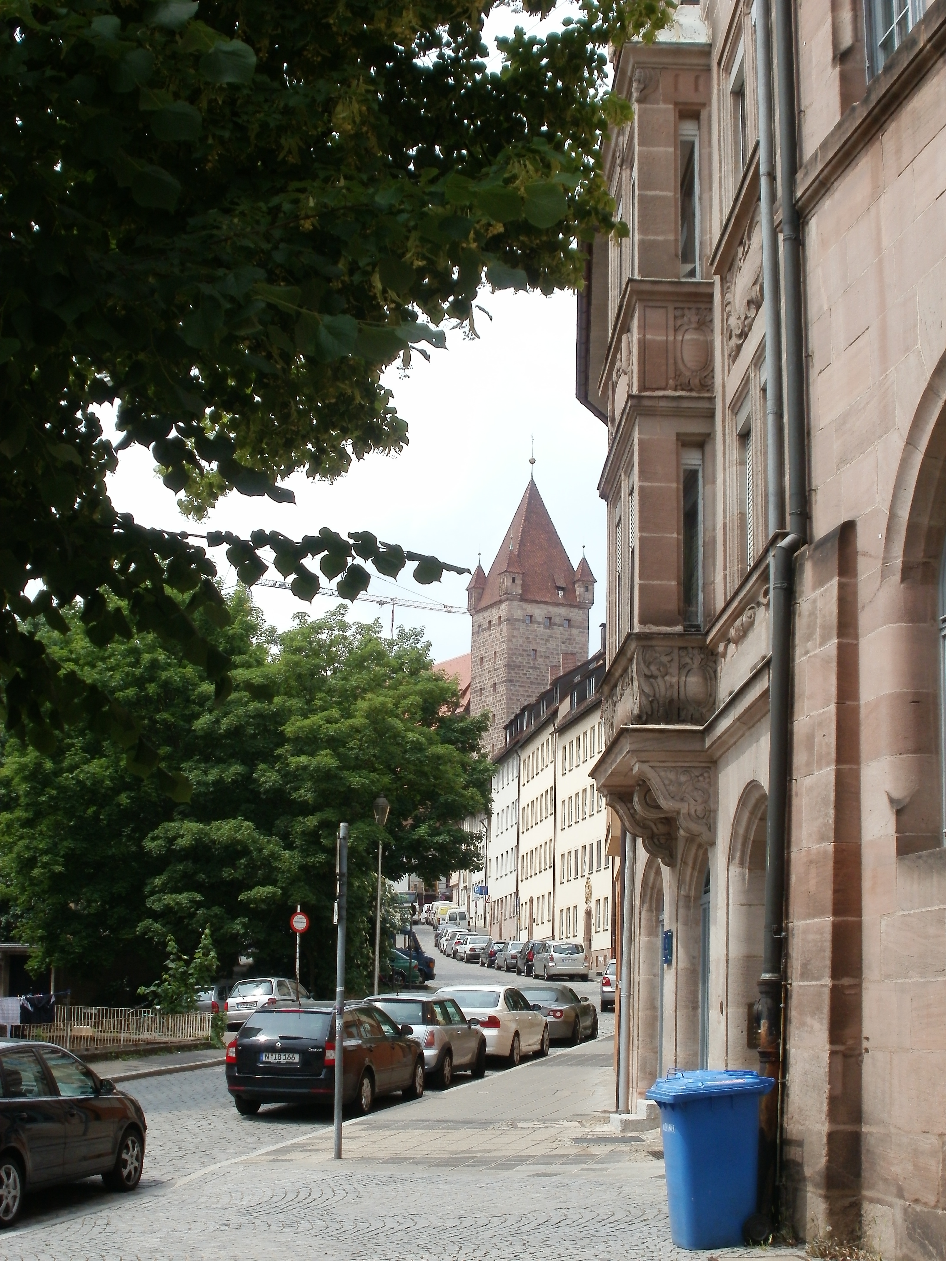 Kaiserburgblick